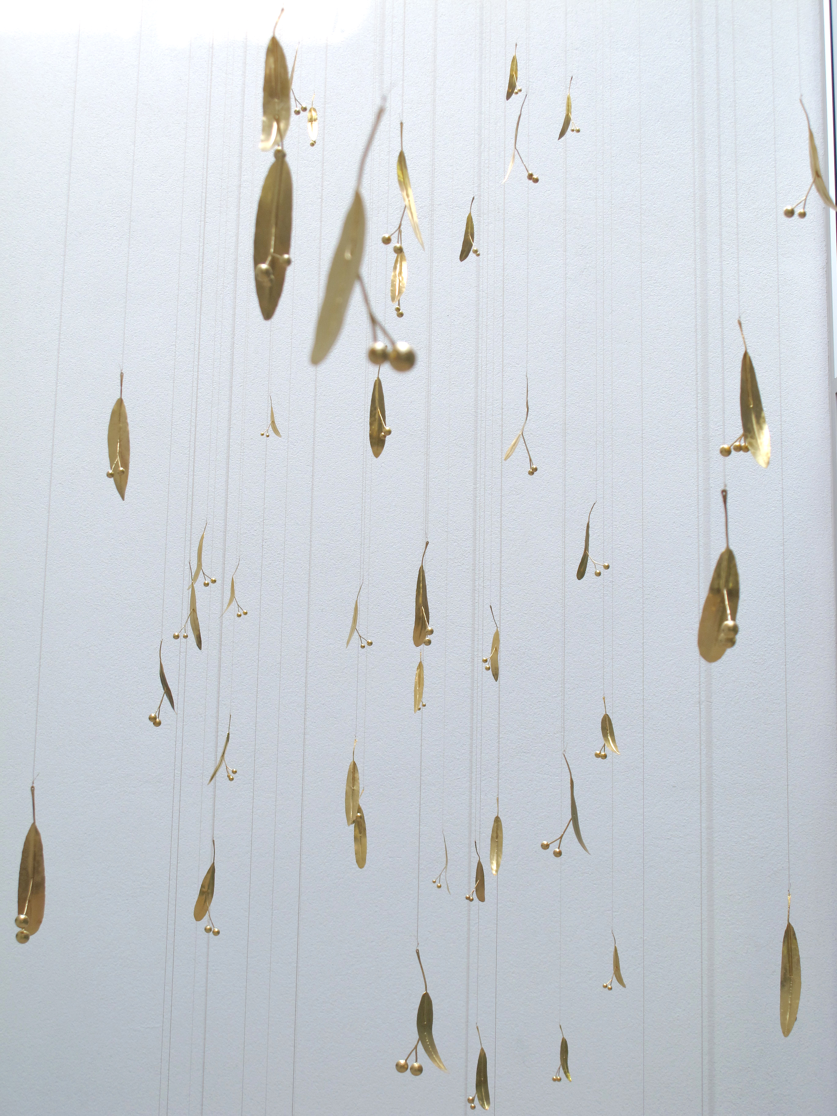 Sonya Friedrich: Lindenblüten, es gibt zuviel Lärm in der Welt. Installation im Kantonsspital Olten. 2012. Detailansicht